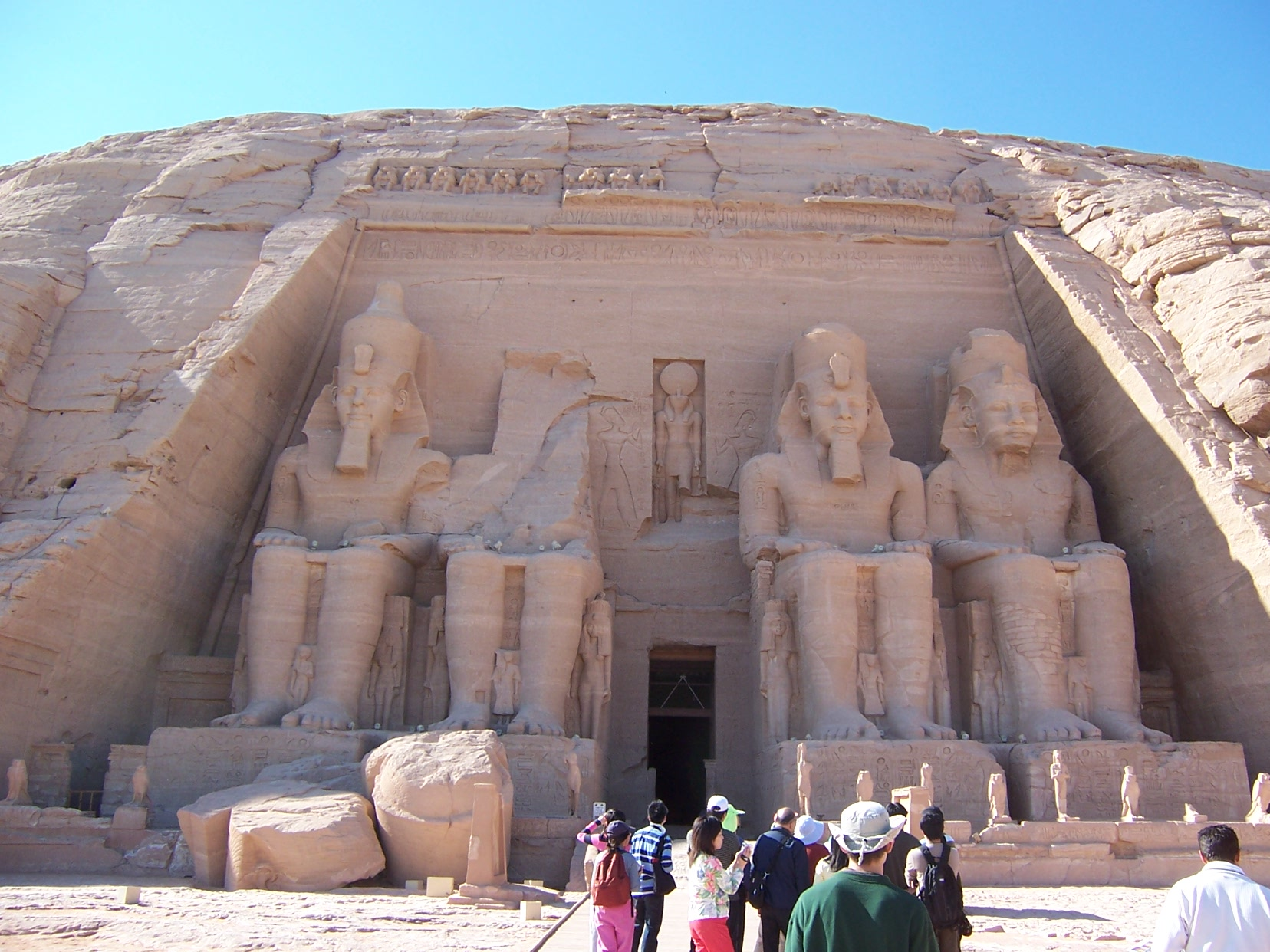 Ancient Temples at Abu Simbel, Egypt